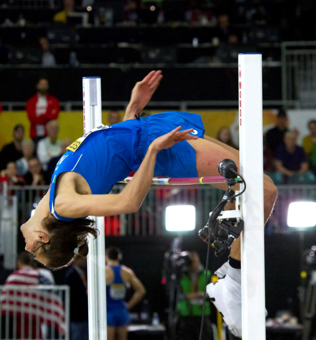 559 tamberi over 2m33